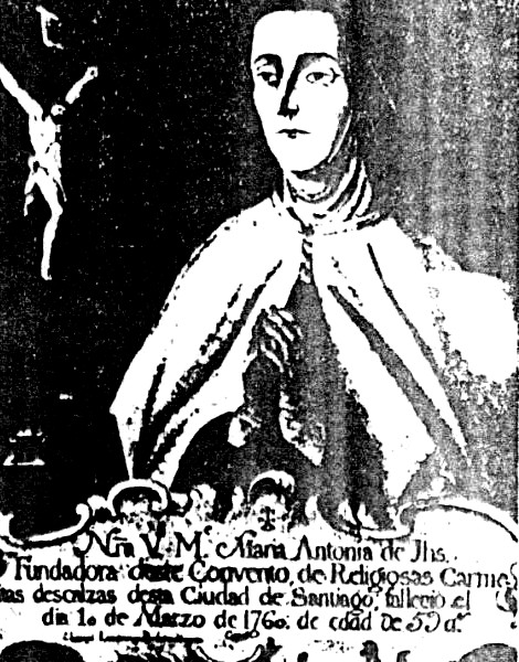 Lienzo de la Sierva de Dios María Antonia de Jesús en el carmelo de Santiago de Compostela